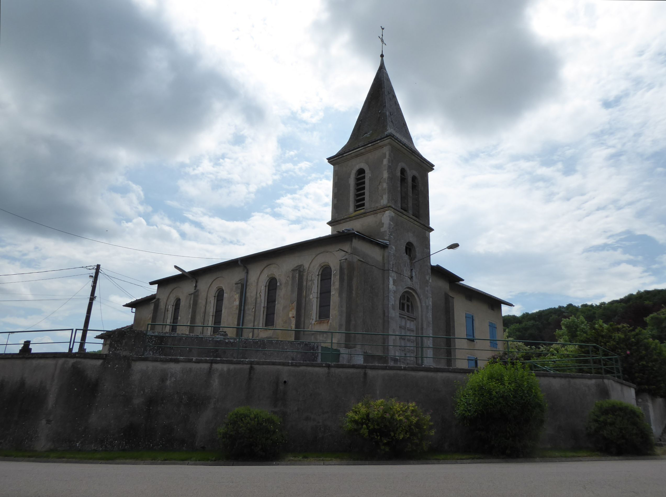 Église de Bratte en Meurthe-et-Moselle (France).